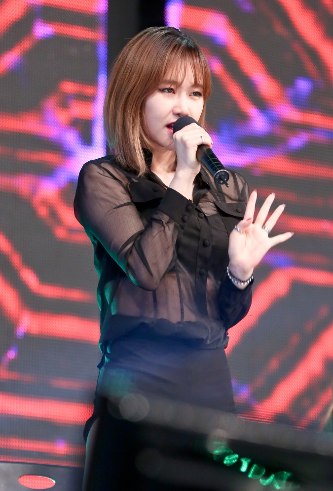 [15.05.27] 원주 위문열차 직찍( 피에스타 재이, 린지, 예지, 혜미, 차오루 )